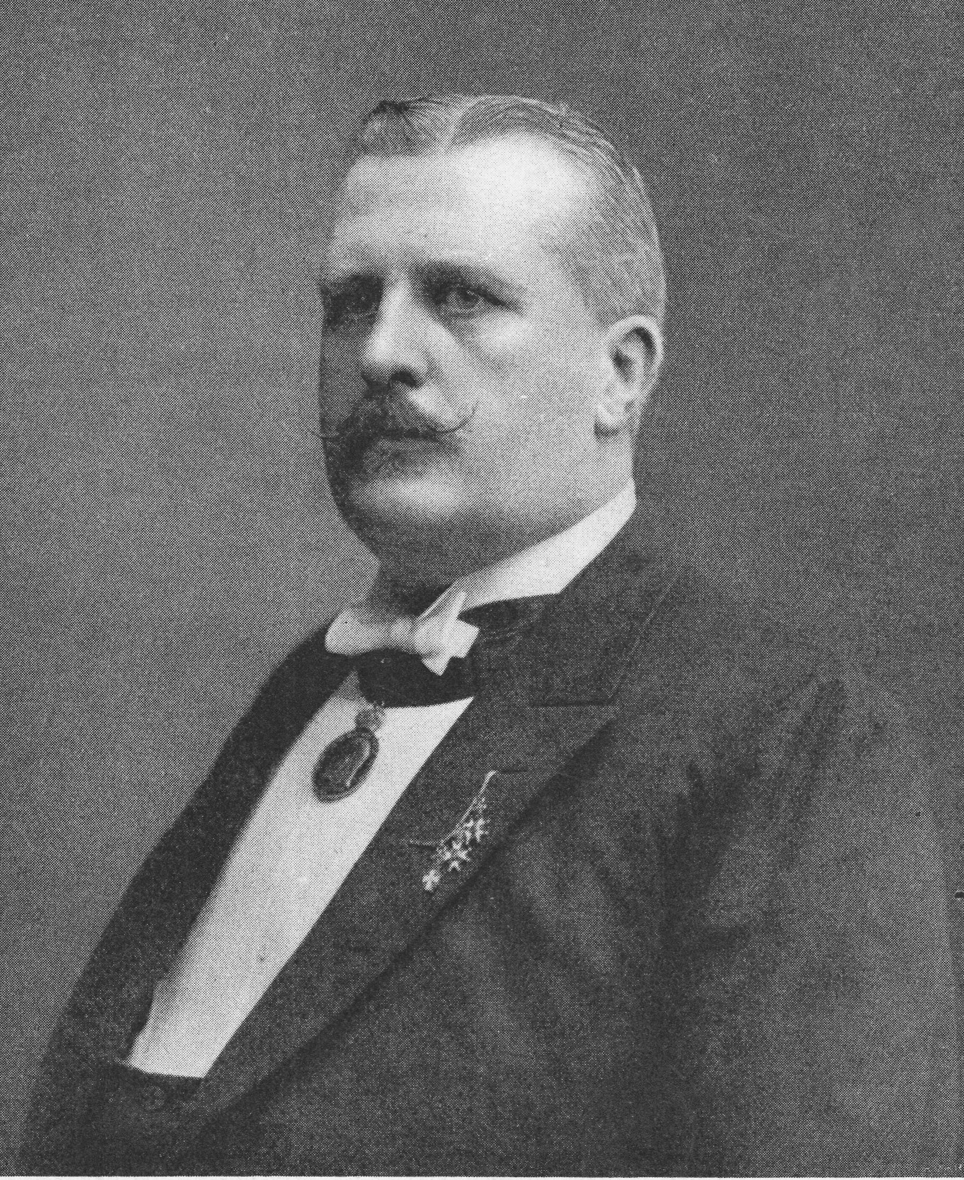 Aaby Ericsson (1859-1921) på omslaget av Hvar 8 Dag 1909